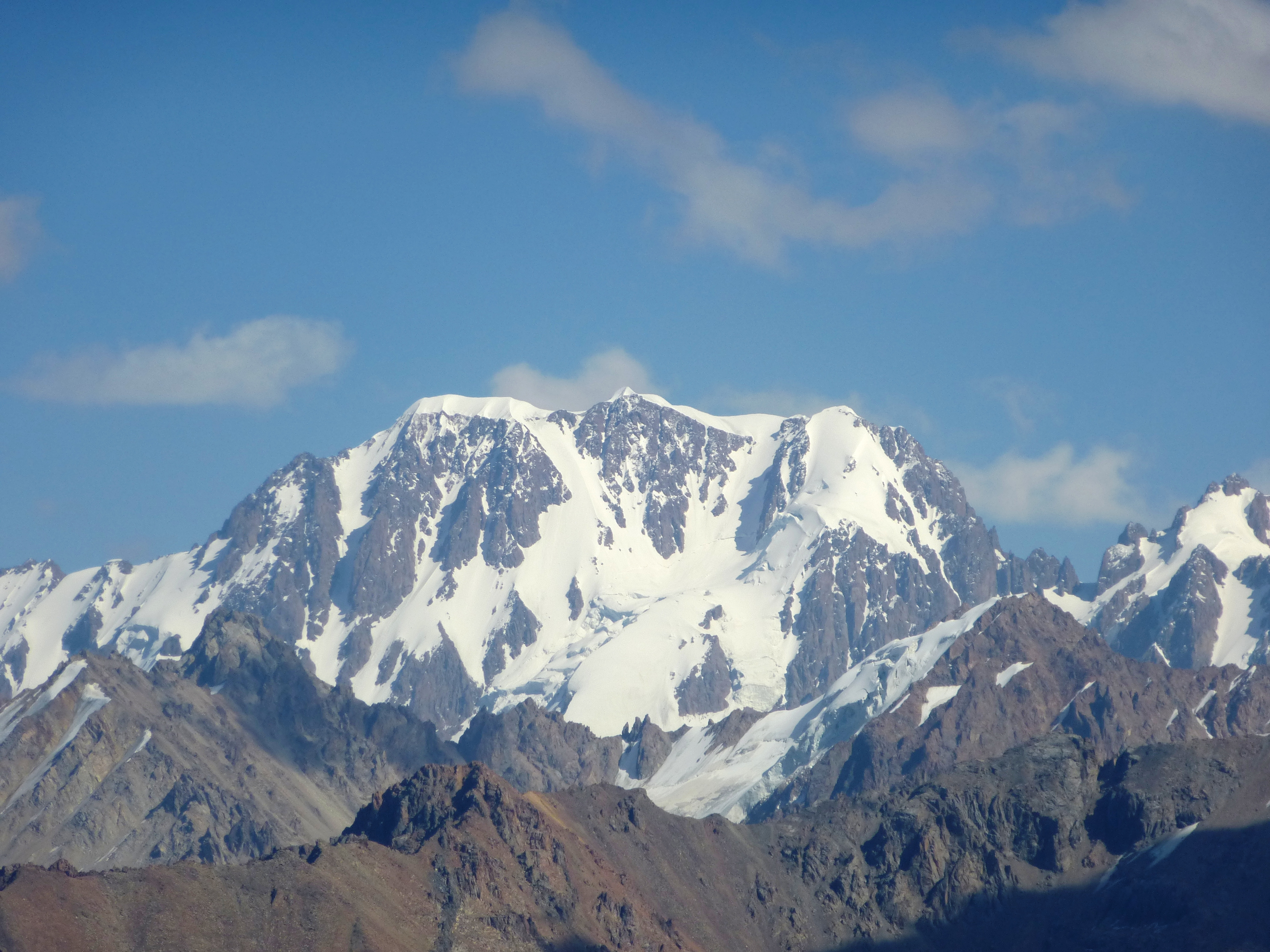 Пик Талгар. Снято с утёса Чимбулачка. Дистанция от точки съёмки до пика — 18 400 метров.